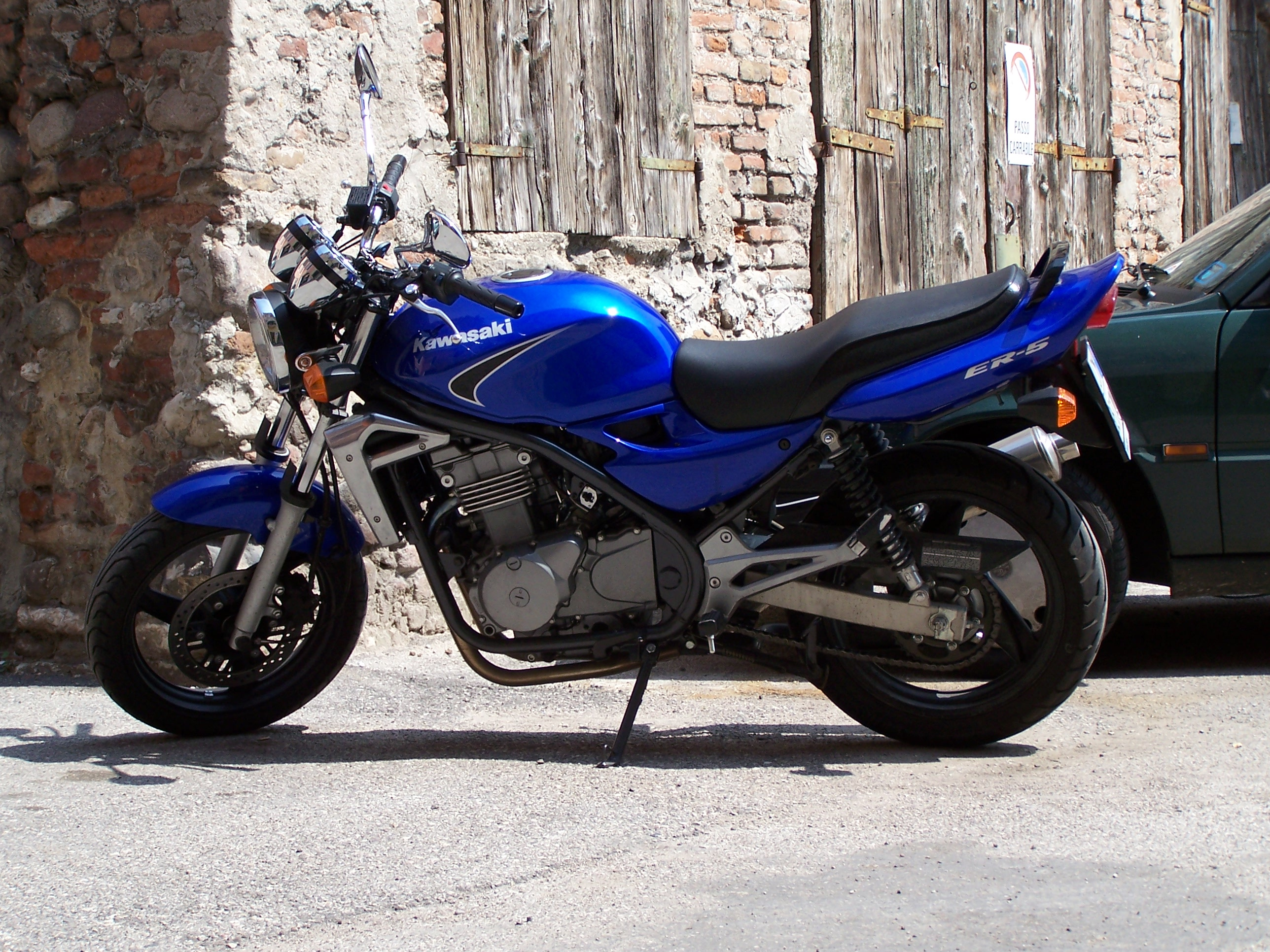 my kawasaki er5 in verona